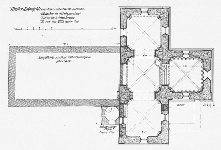 Evangelische Kirche in Lobenfeld